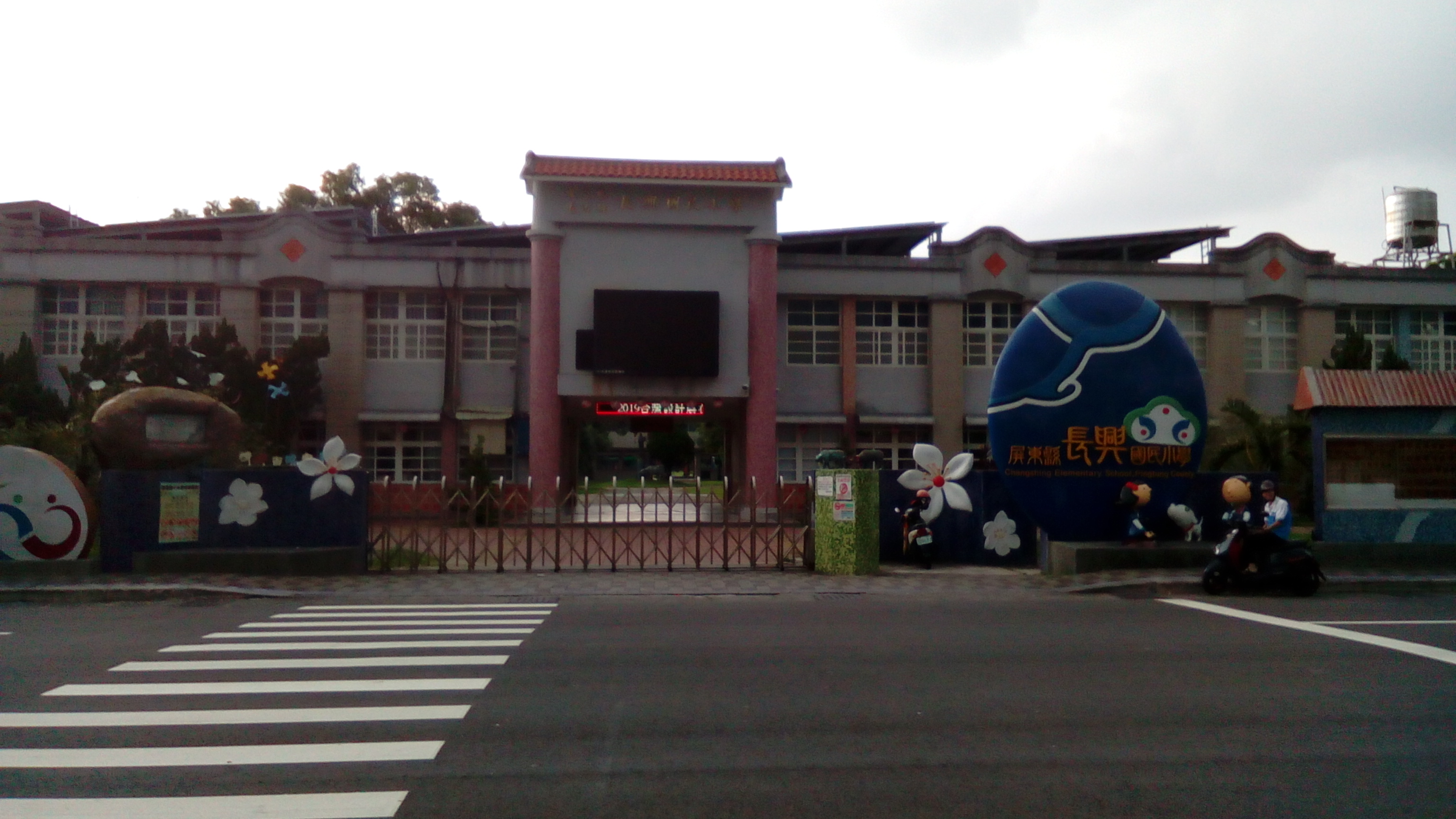 同上